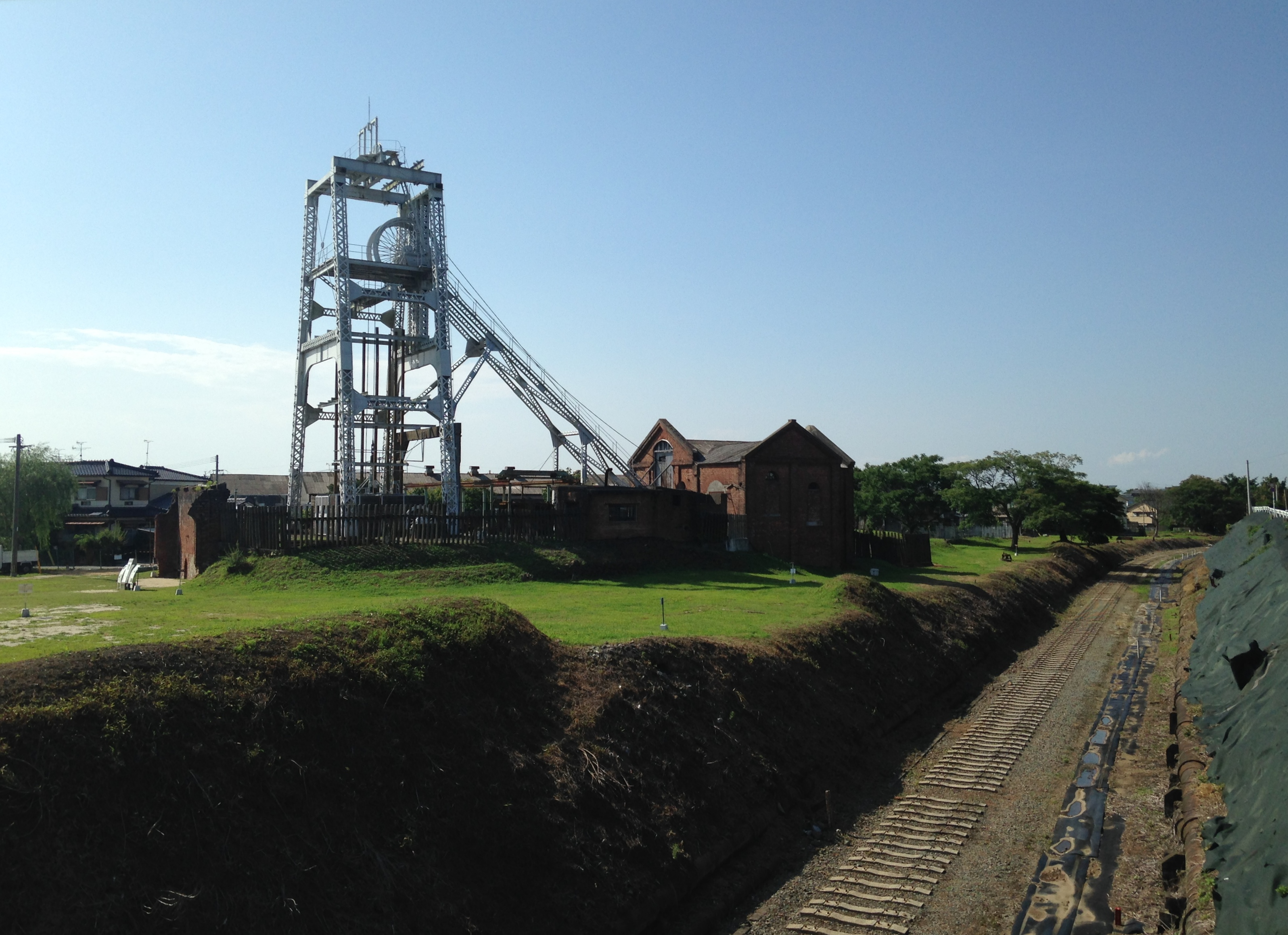 三池鉄道本線跡に架かる橋より望む宮原坑